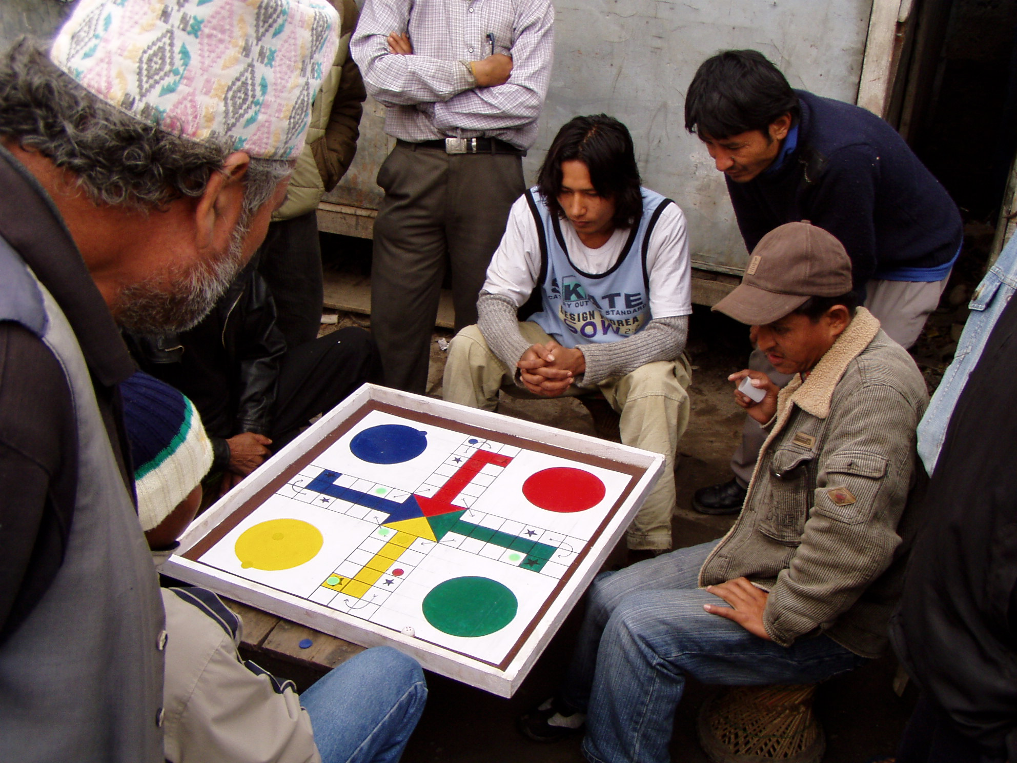 Pachisi-Variante auf einem Ludo-Brett in Nepal